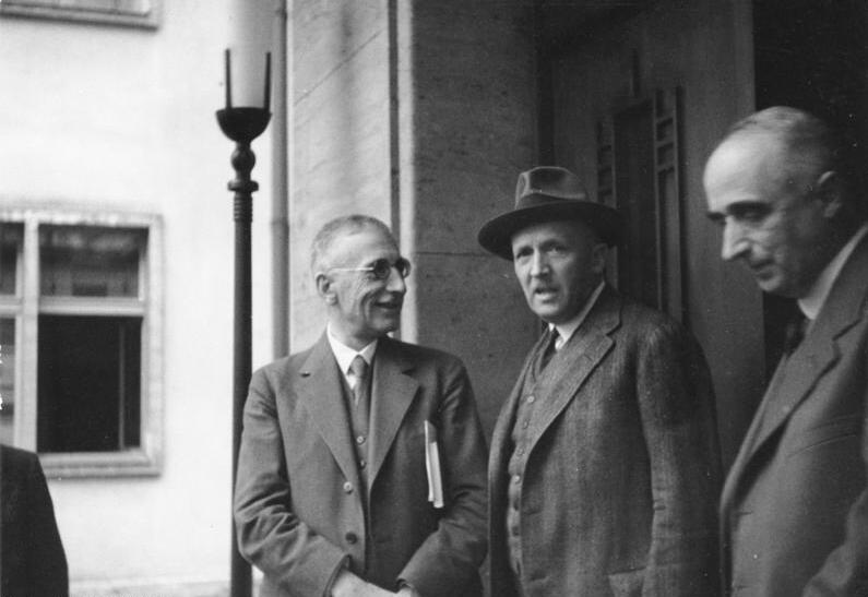 Vor der Reichskanzlei - Kabinett Papen, August 1932